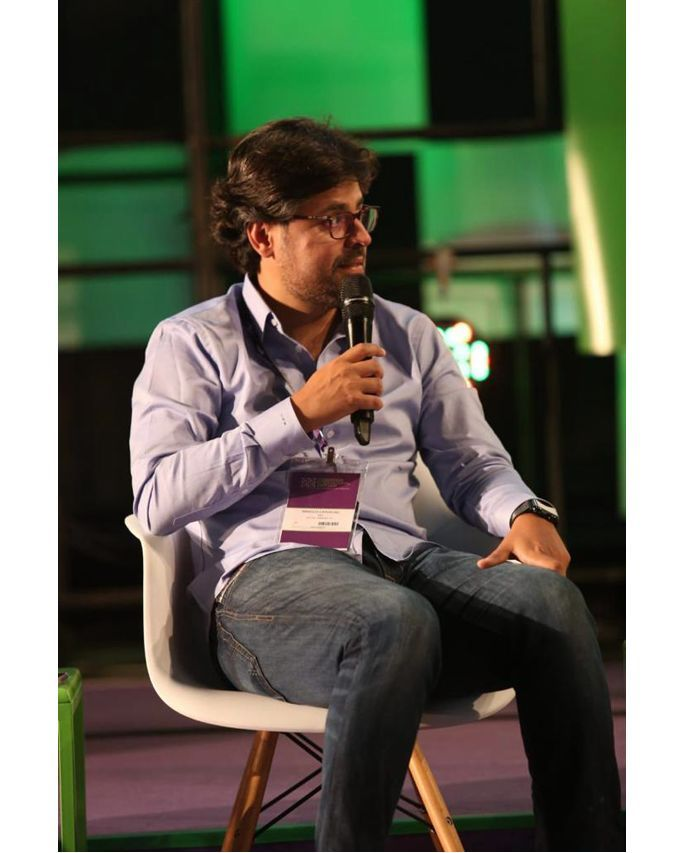 Foto de Marcos Aurélio Carvalho, diretor da empresa AM4, no Congresso Internacional da ABIT, palestrando sobre a Comunicação Omnichannel.